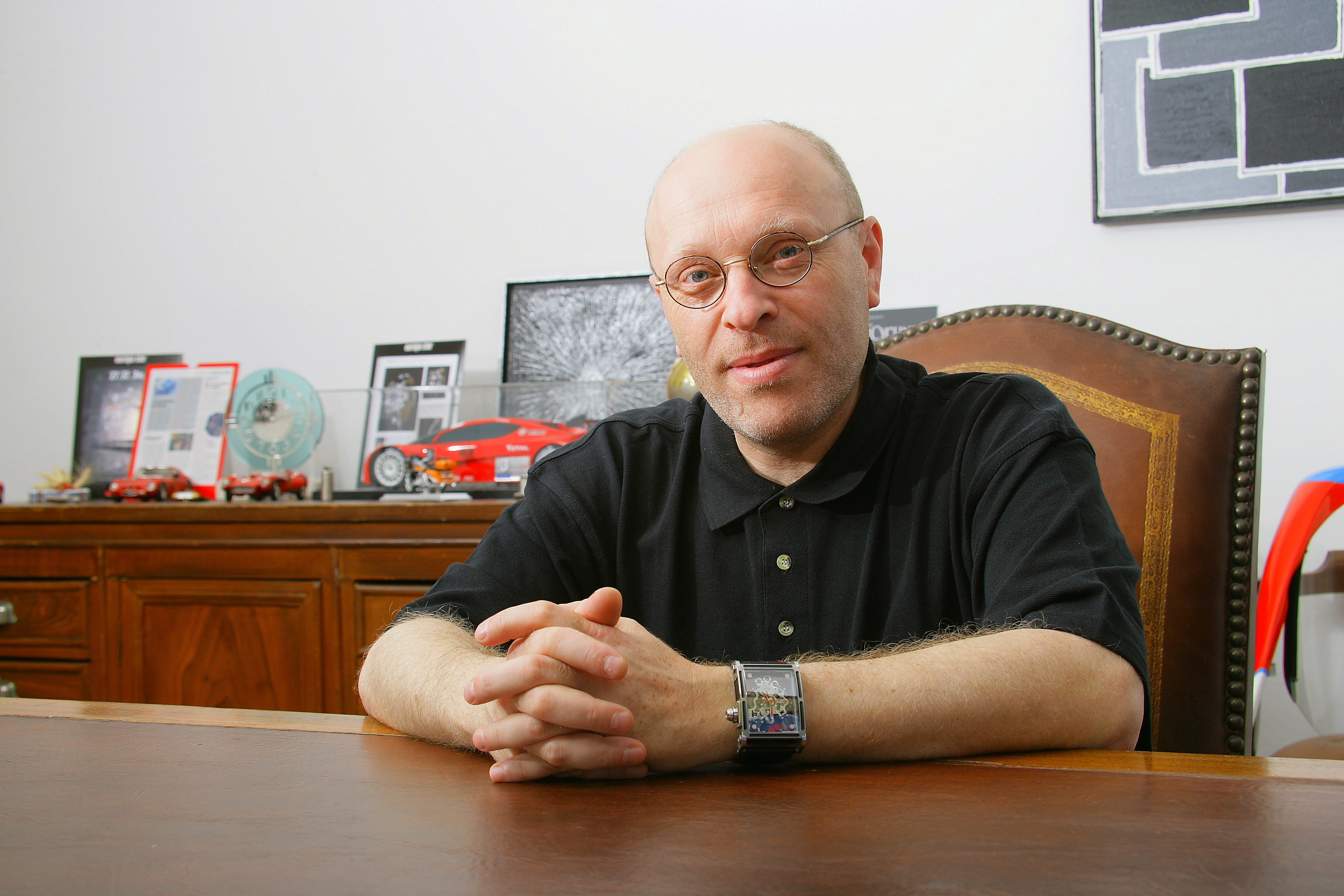 Fondateur de BRM